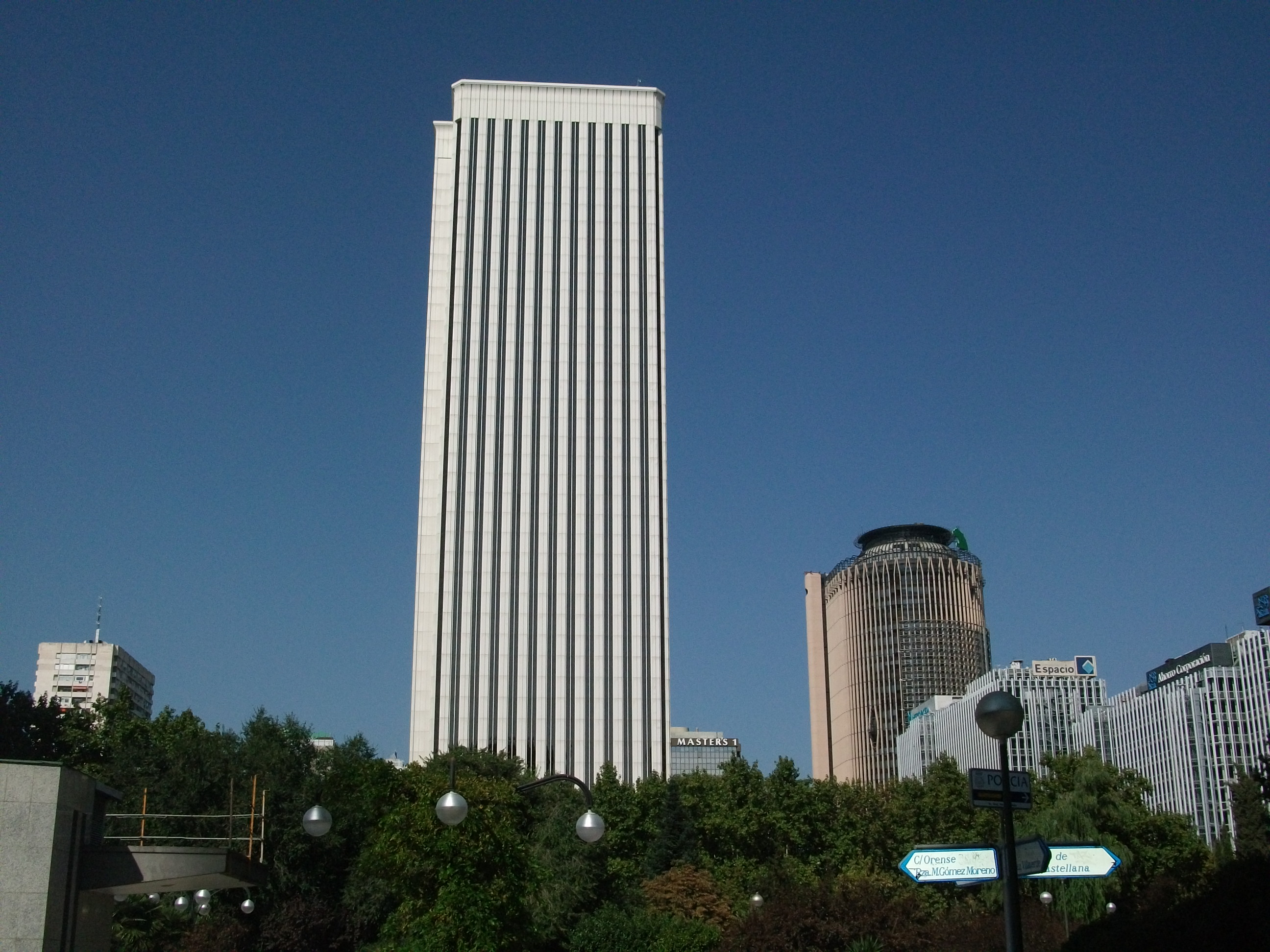 Complejo Azca